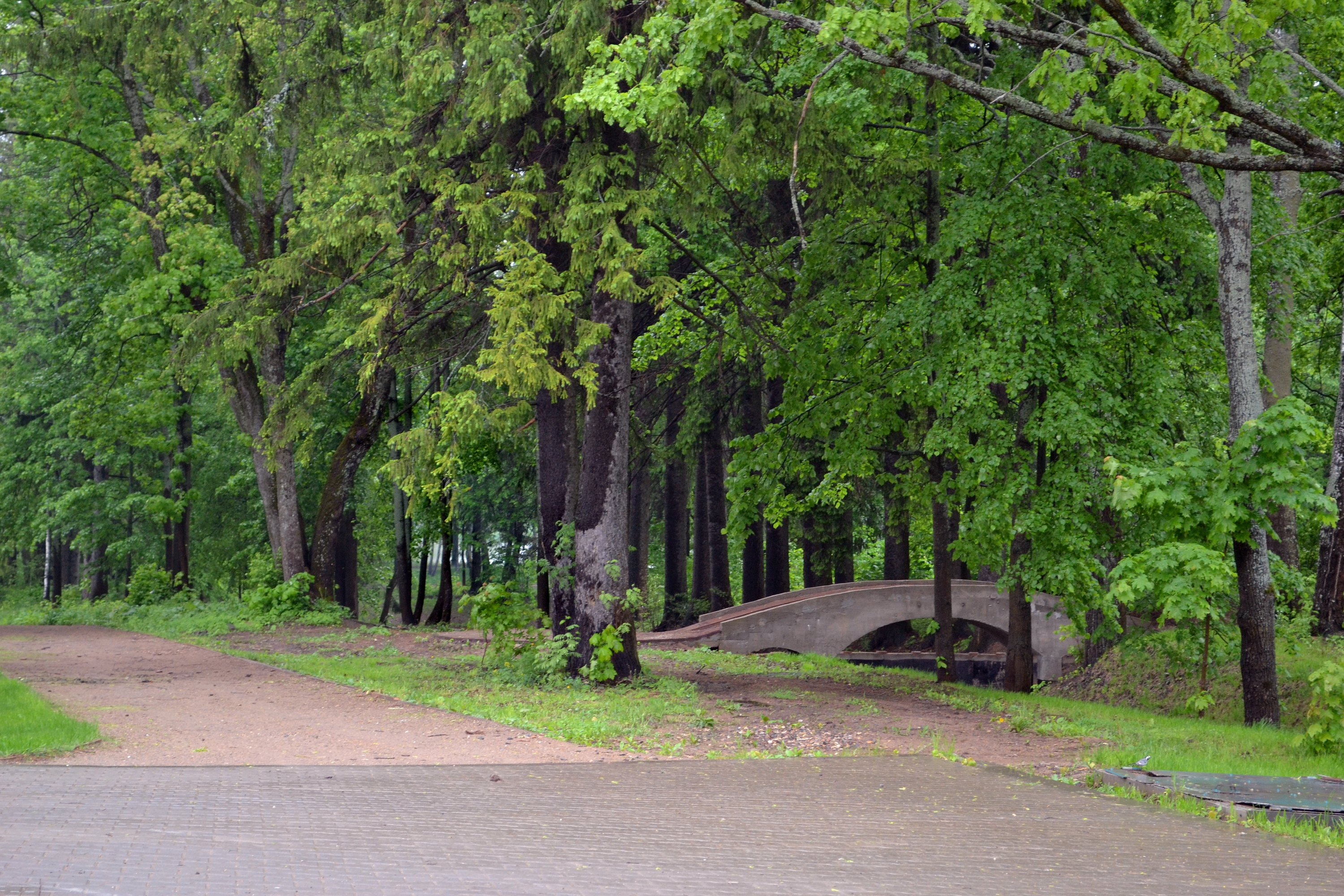 Парк: Воронино, Ростовский район, Ярославская область